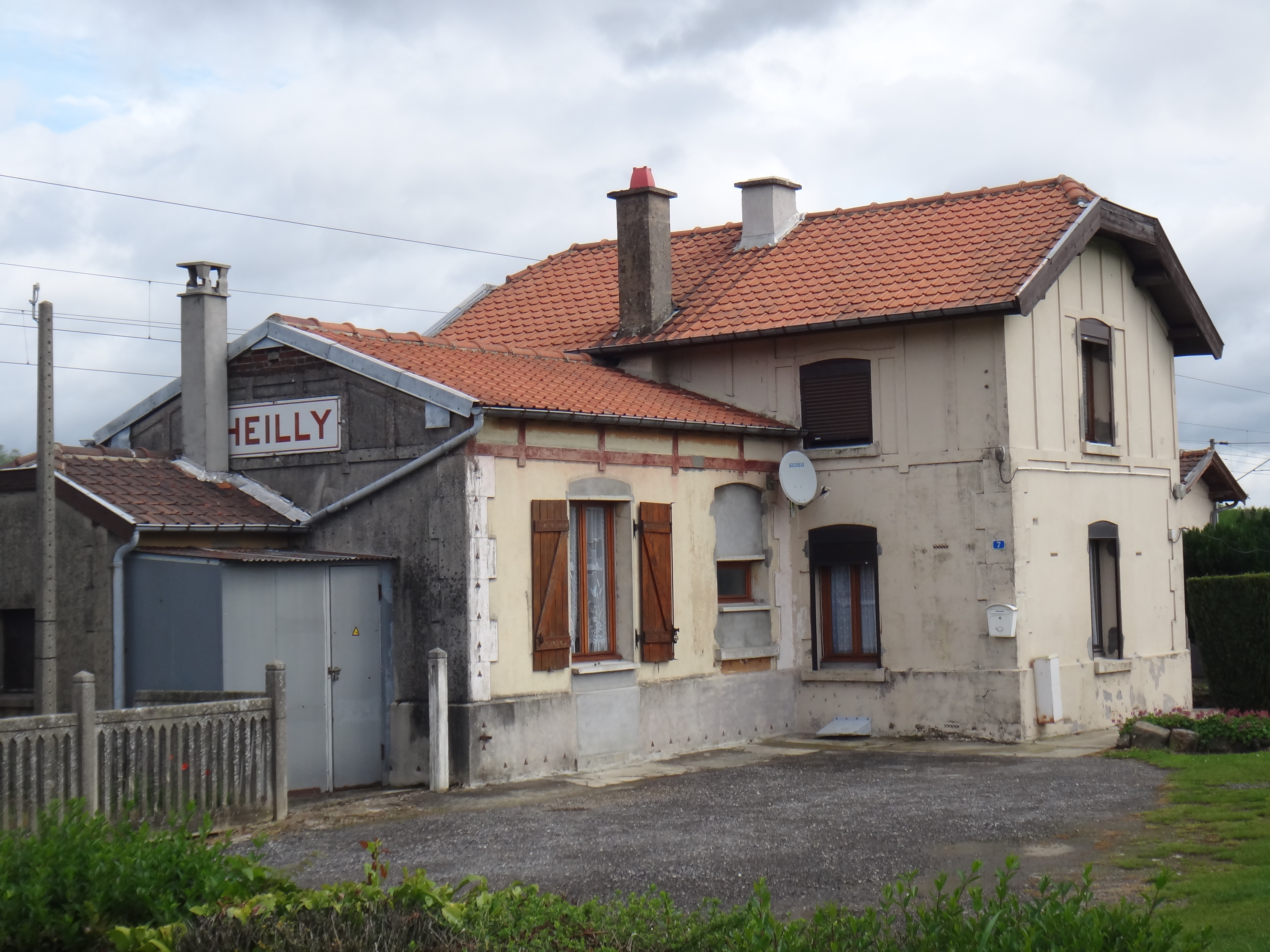 Ancien bâtiment de la gare d'Heilly, Somme, France, en mai 2014.